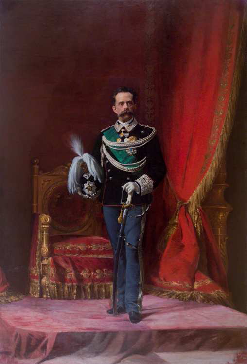 Ritratto di S.M. Re Umberto I